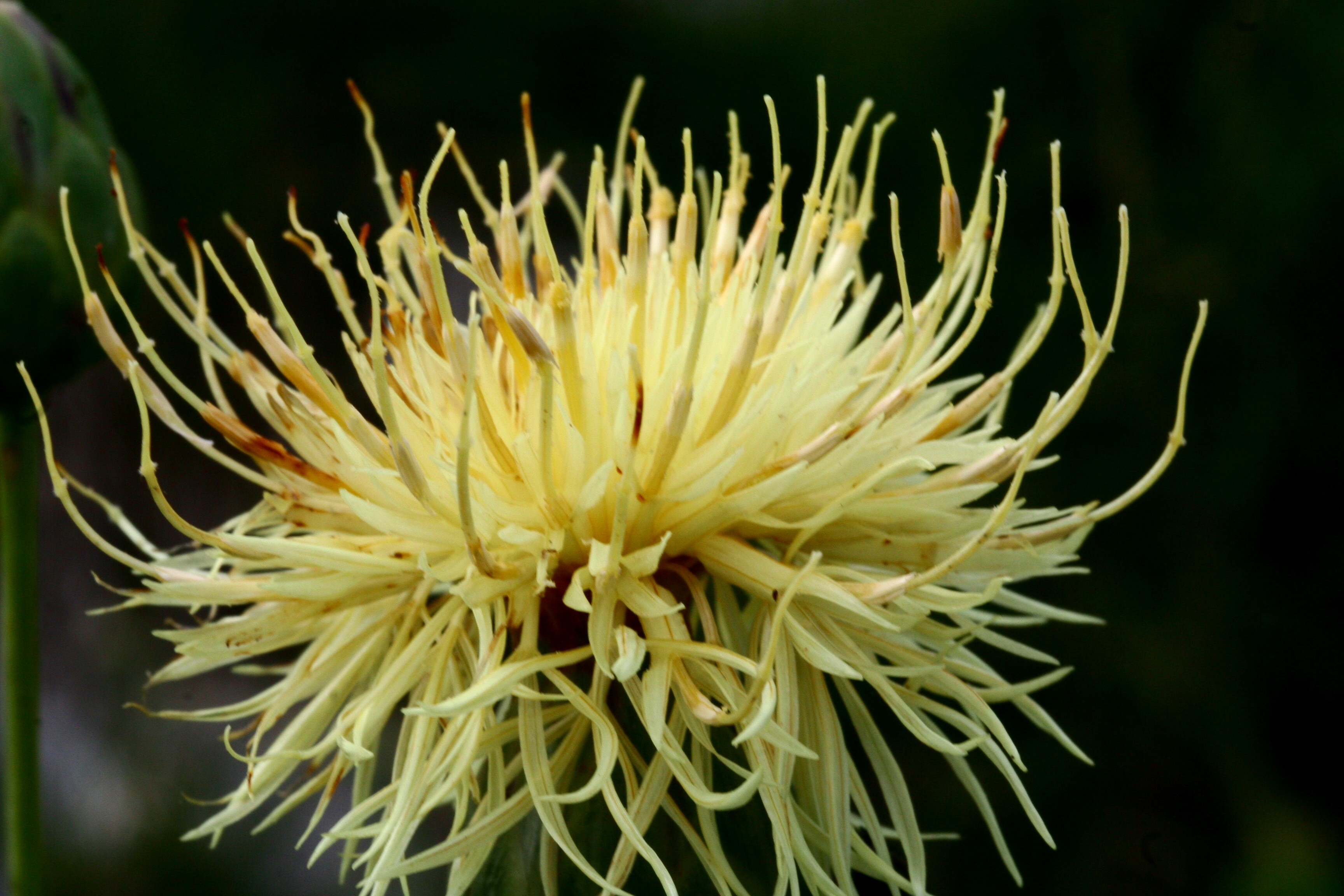 Centaurea alpina - Località: "Giardino Botanico delle Alpi Orientali", Monte Faverghera (BL), 1500 m s.l.m.